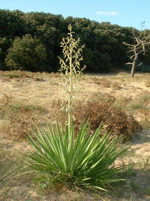 yucca